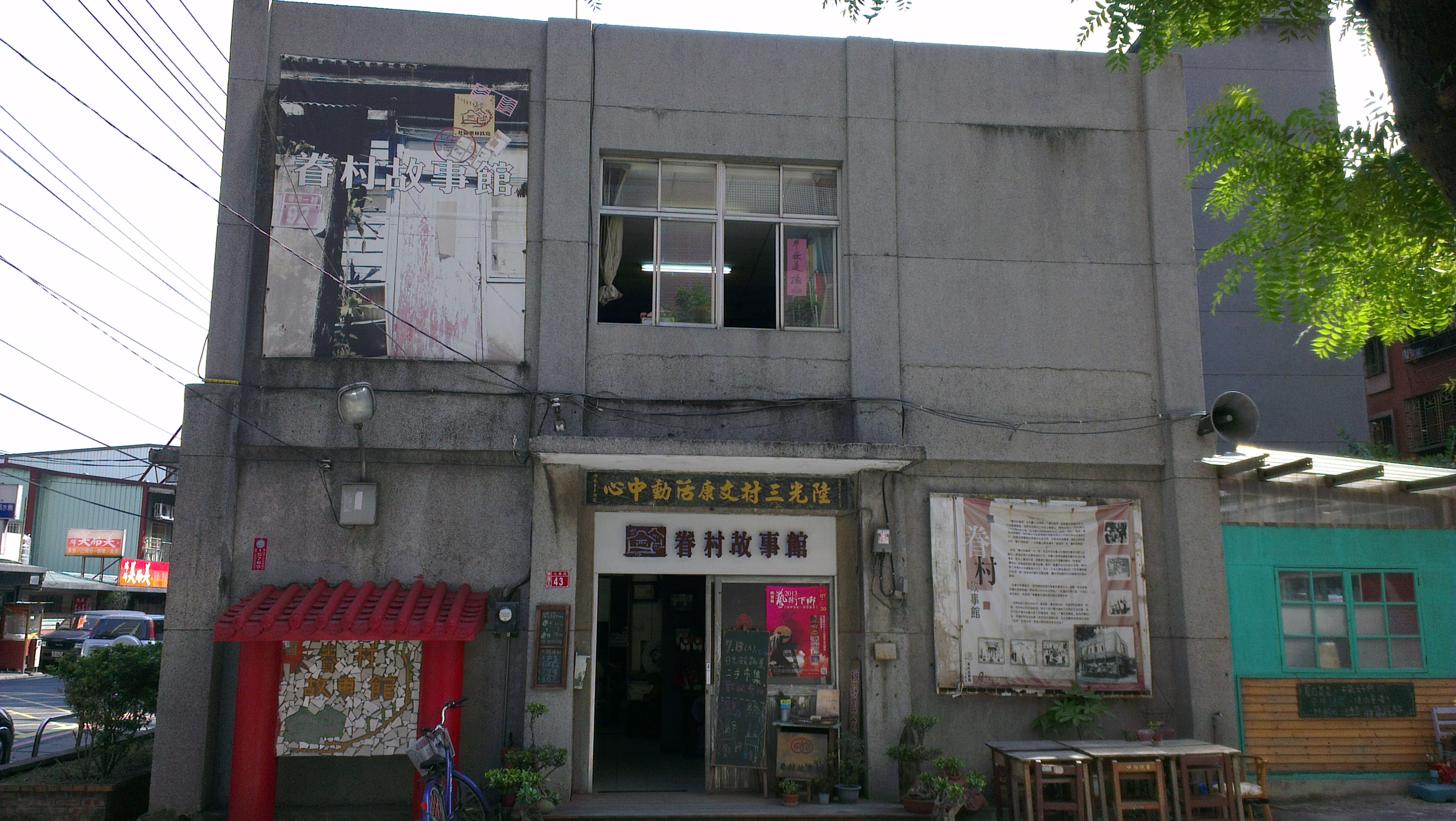 中文（台灣）: 桃園縣龜山鄉，前陸光三村文康活動中心 (眷村故事館)